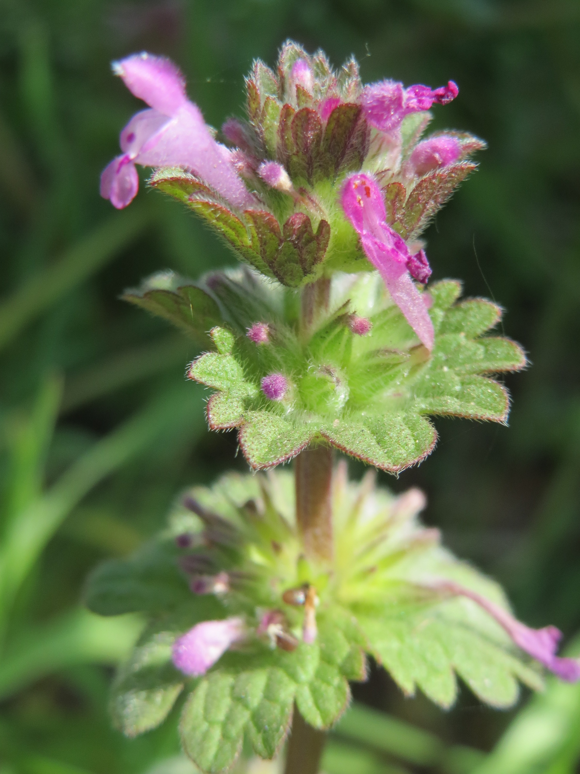 Stängelumfassende Taubnessel (Lamium amplexicaule) in Hockenheim